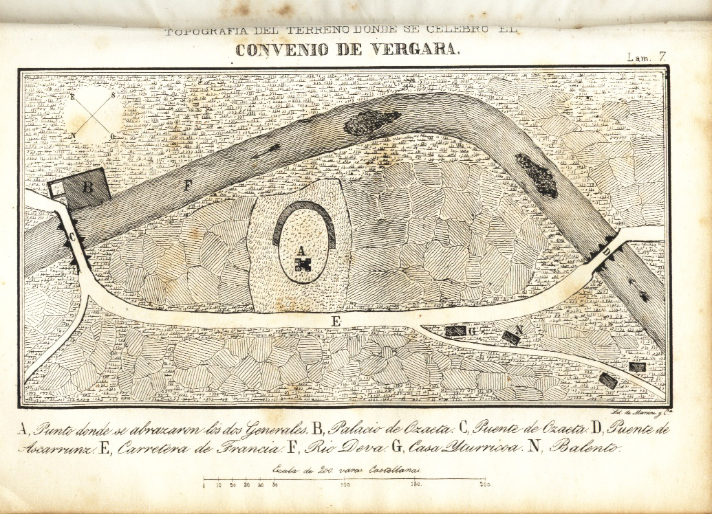 Topografía del terreno donde se celebró el Convenio de Vergara. José Segundo Flórez. "Espartero". Madrid 1844